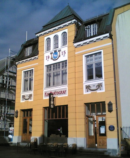 Bildet viser Verdensteateret kino og kafé nord i Storgata i Tromsø.